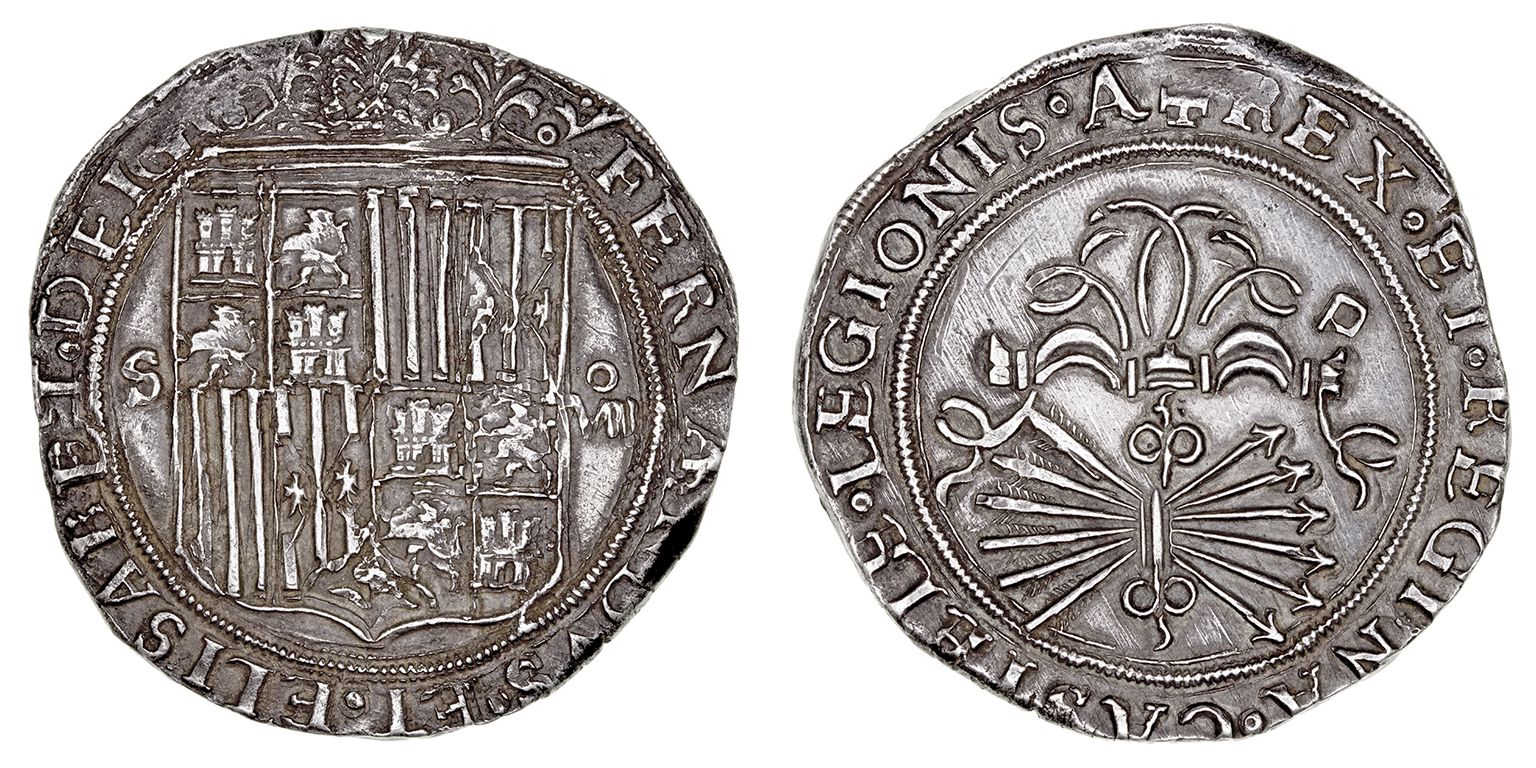 REYES CATÓLICOS. 8 Reales. AR. Sevilla D Cuadrada. s/f. Con S y valor a los lados del escudo. En rev. D cuadrada. 27,32 g. CAL.185. Rara así. EBC-/EBC